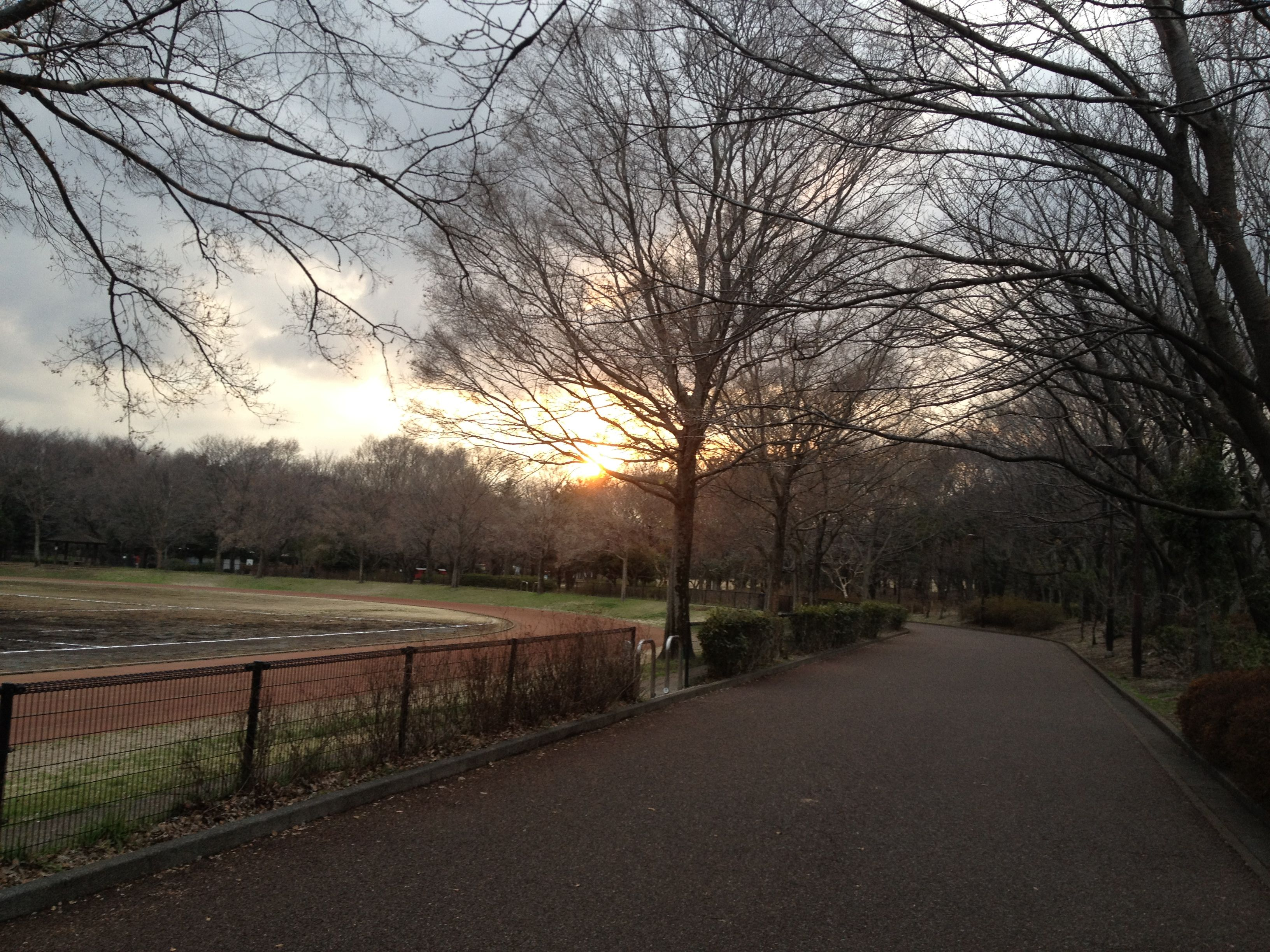 都立大泉中央公園の冬